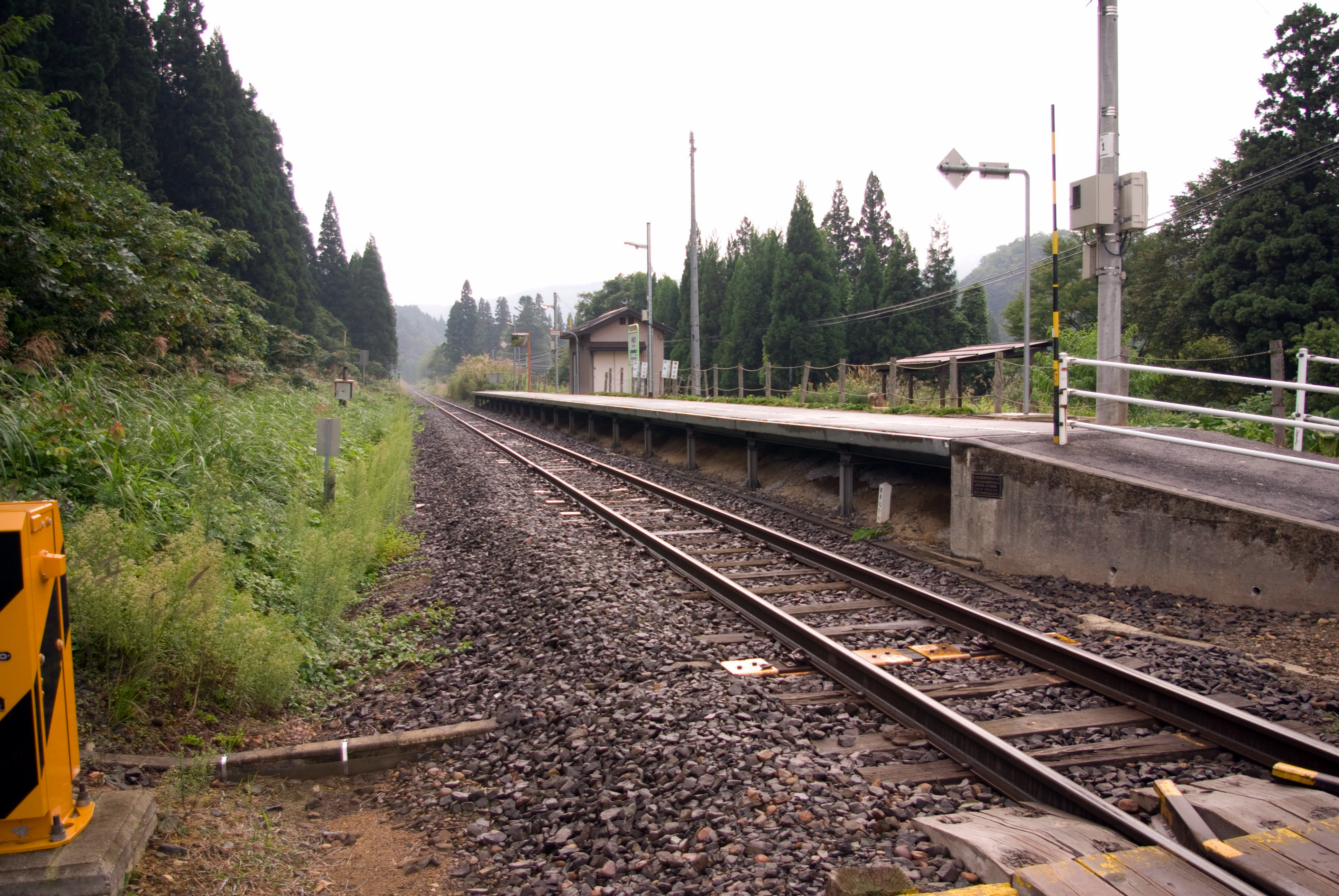 東日本旅客鉄道株式会社北上線小松川駅